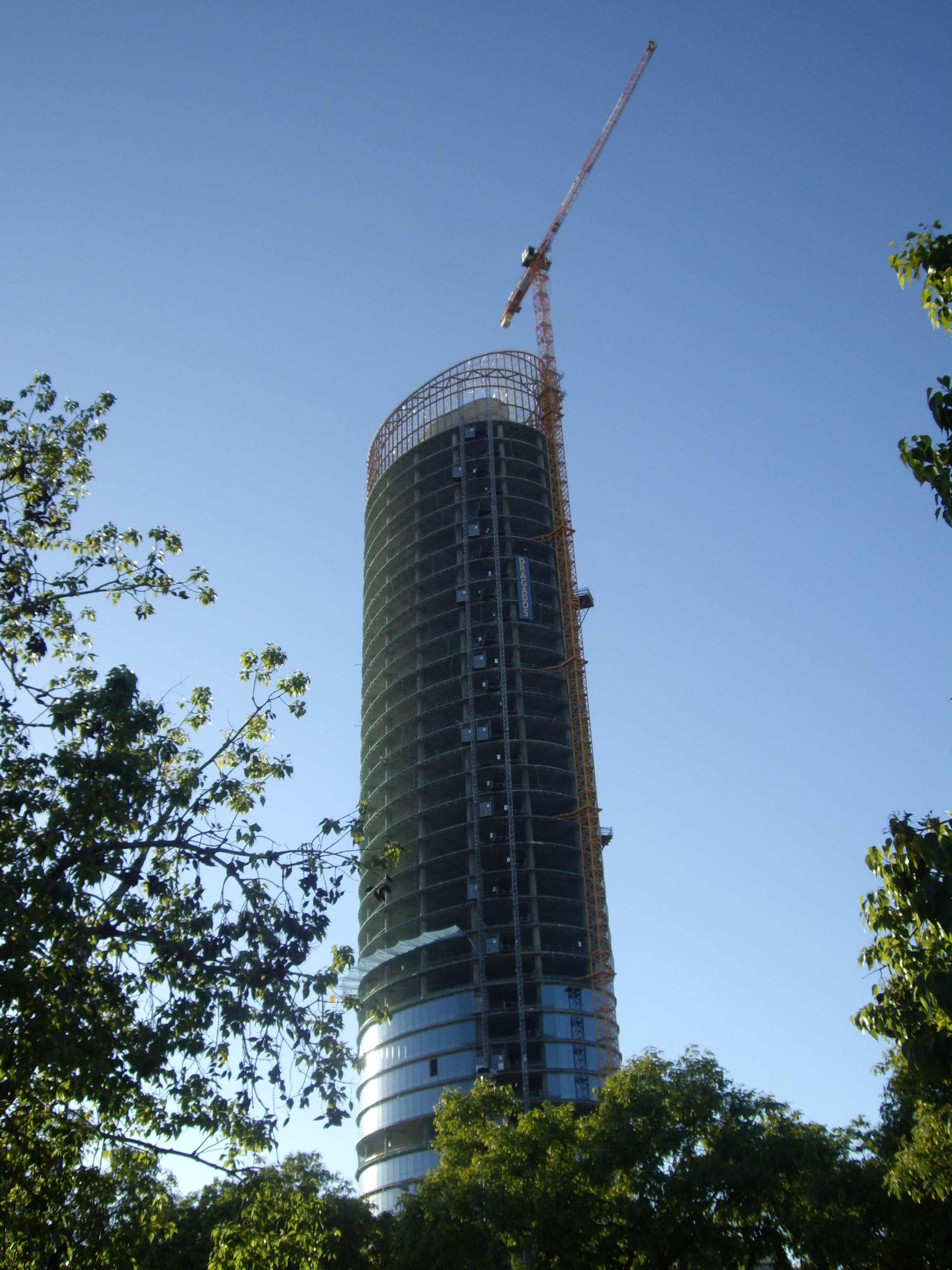 Torre Cajasol, diseñada por César Pelli, desde la Plaza de Chapina de Sevilla en agosto de 2013